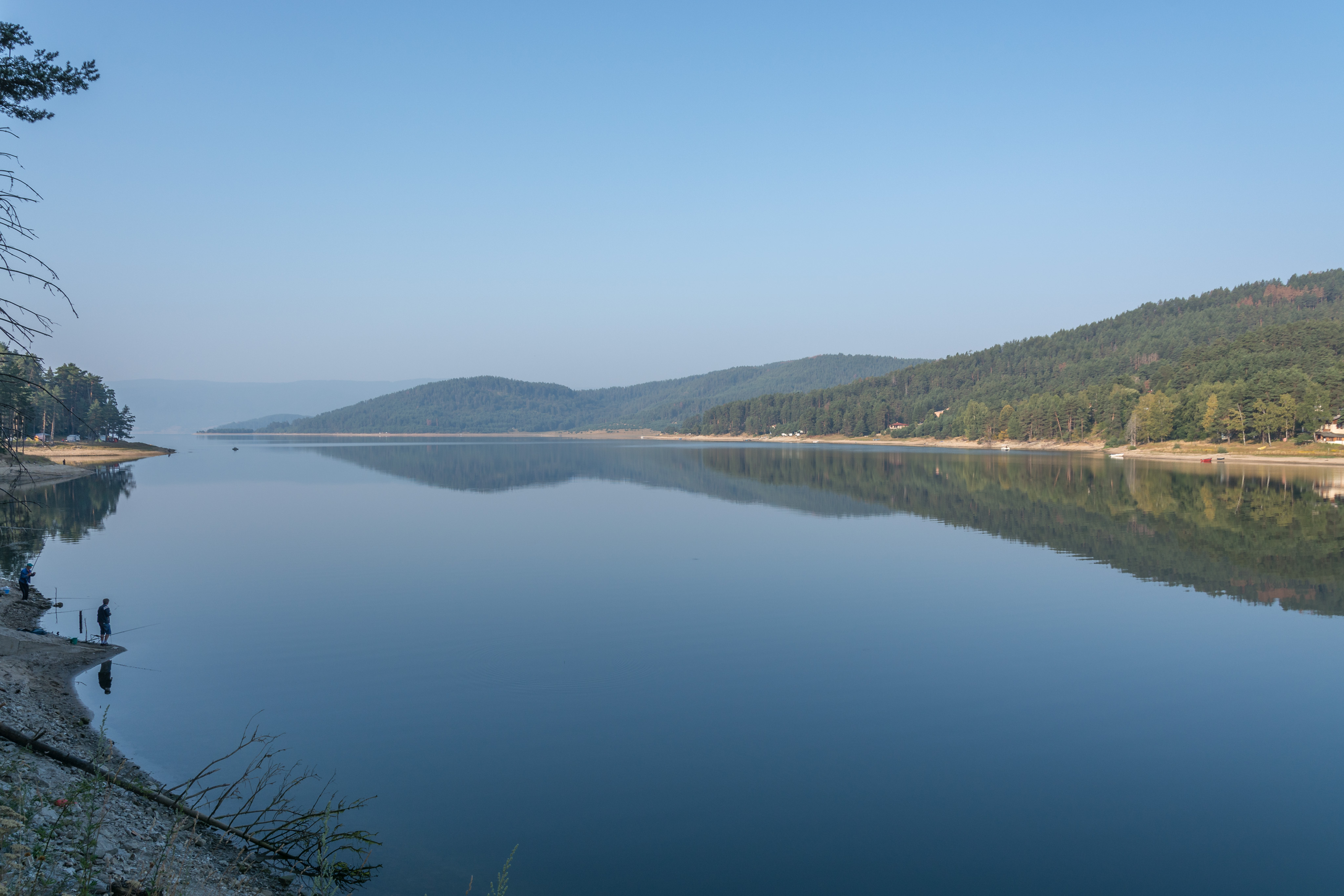 Язовир Батак